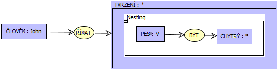 Konceptuální graf - vnořený graf. Inspirace